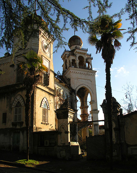 Former Aloisi Villa in Sukhumi, Abkhazia